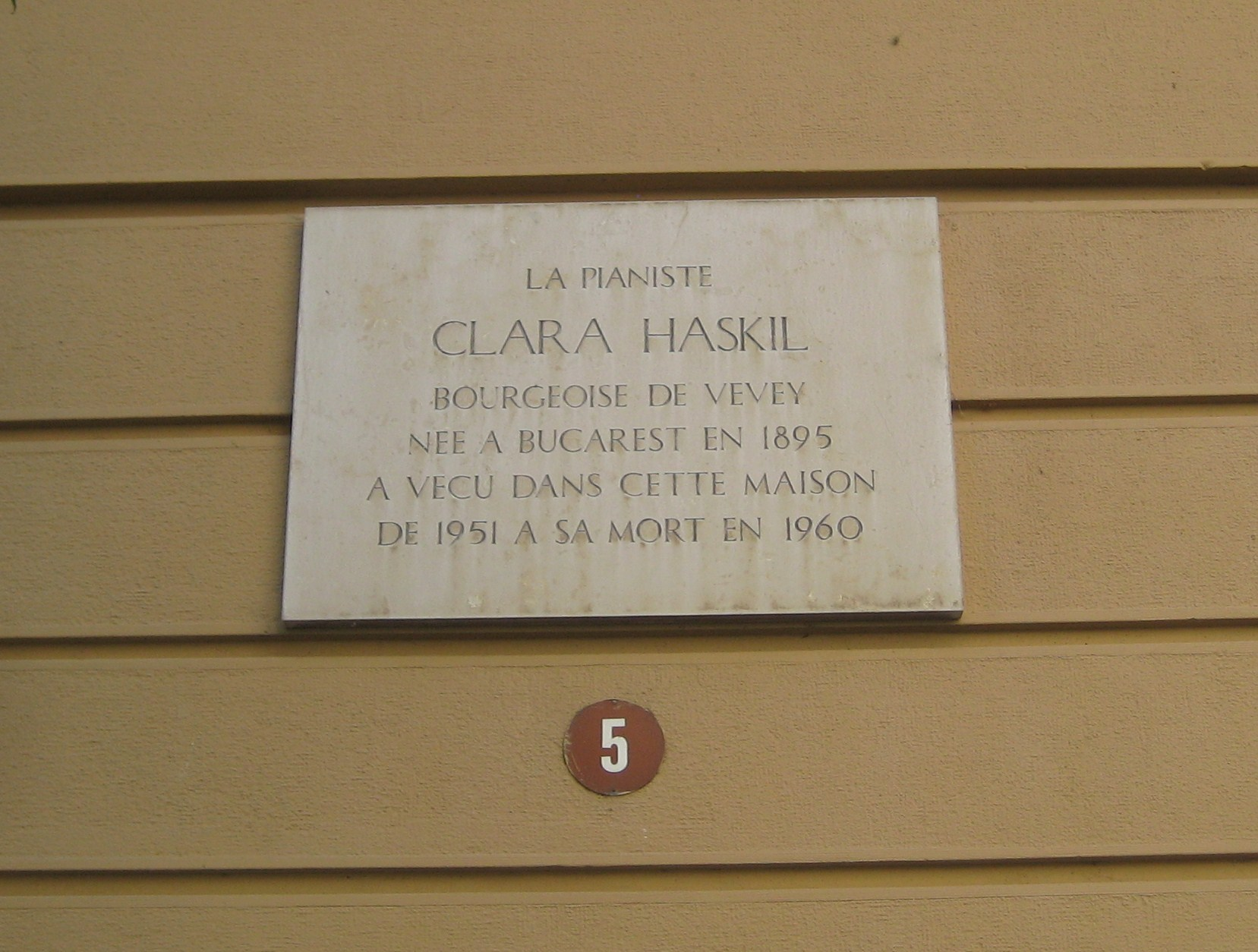 plaque sur la maison de Clara Haskil, Vevey